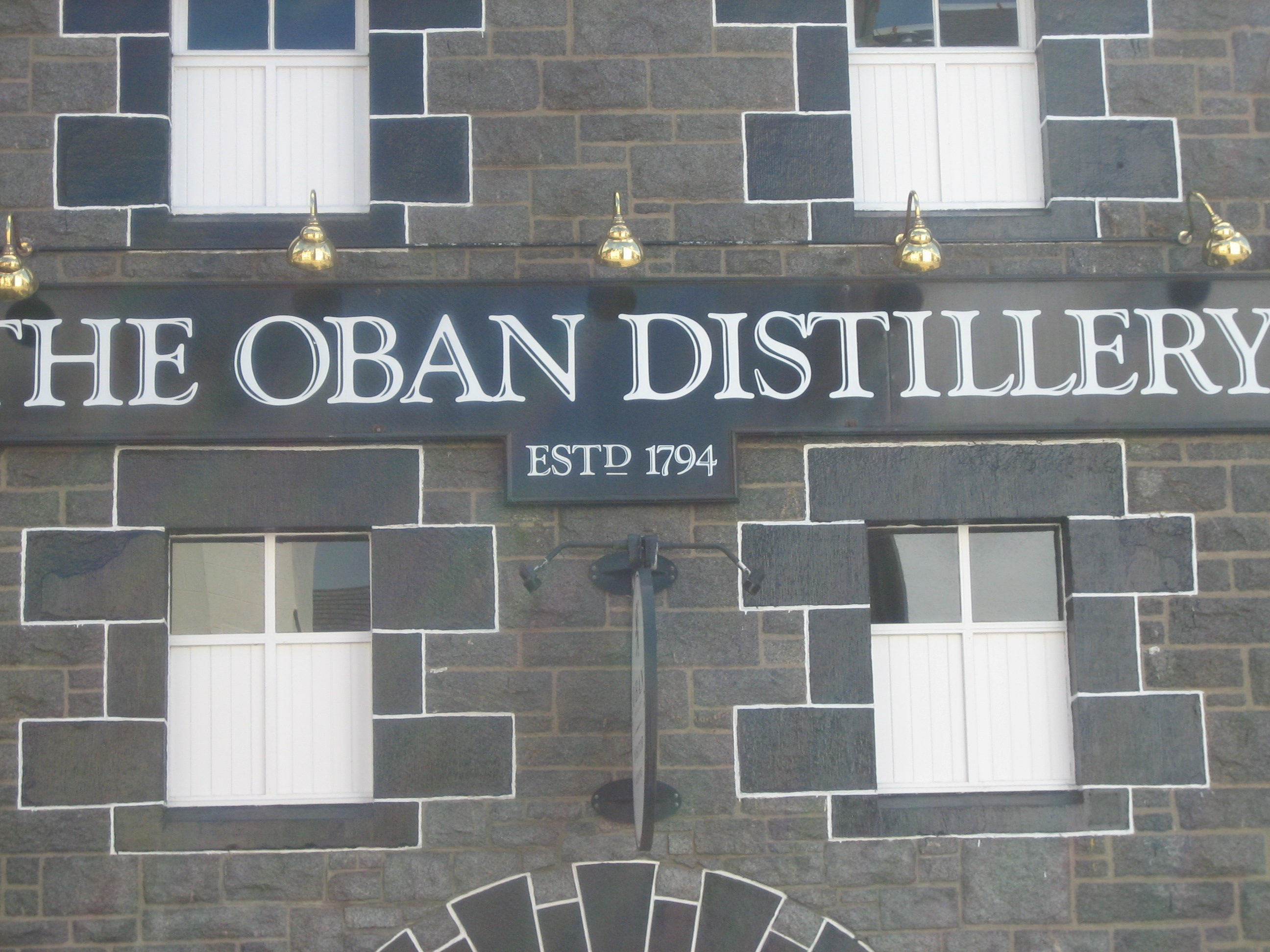 façade de la distillerie d'Oban